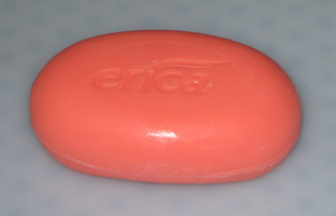 Tualetsapo Erica